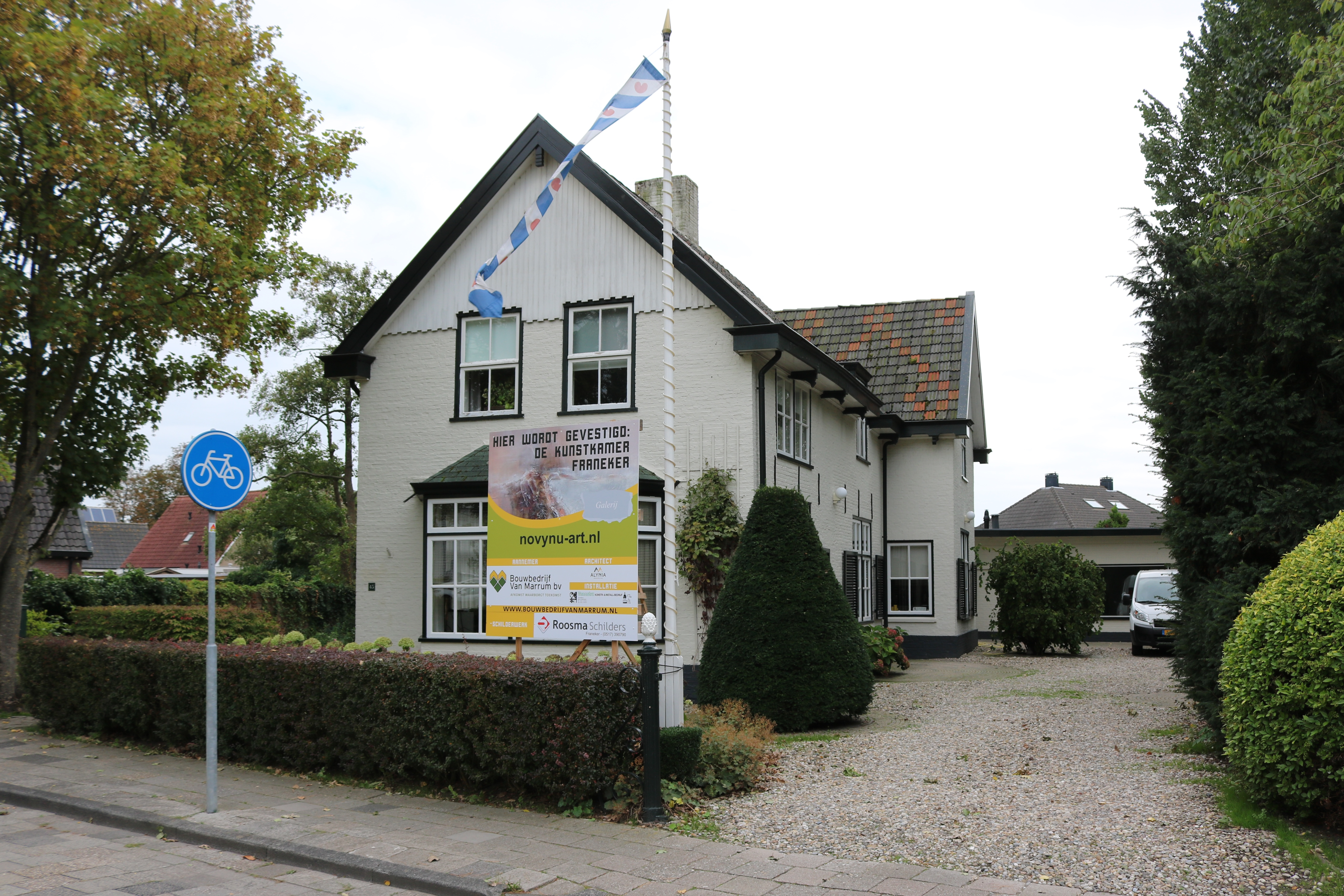 Station Franeker Halte (foto: Daniel van der Ree, 20 september 2018)